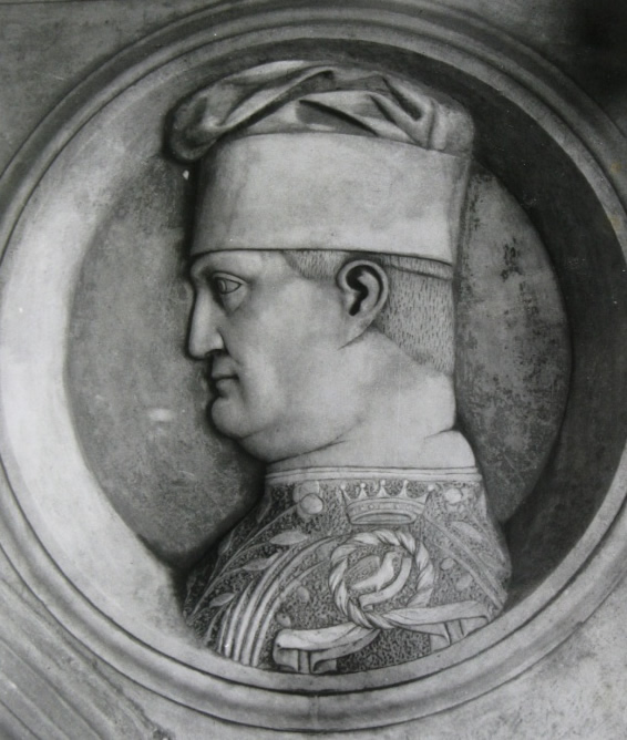 Felipe Maria Visconti, duque de Milán entre 1441 y 1447. Fue quien encargó la baraja de Tarot más antigua de la que se tiene conocimiento hoy.